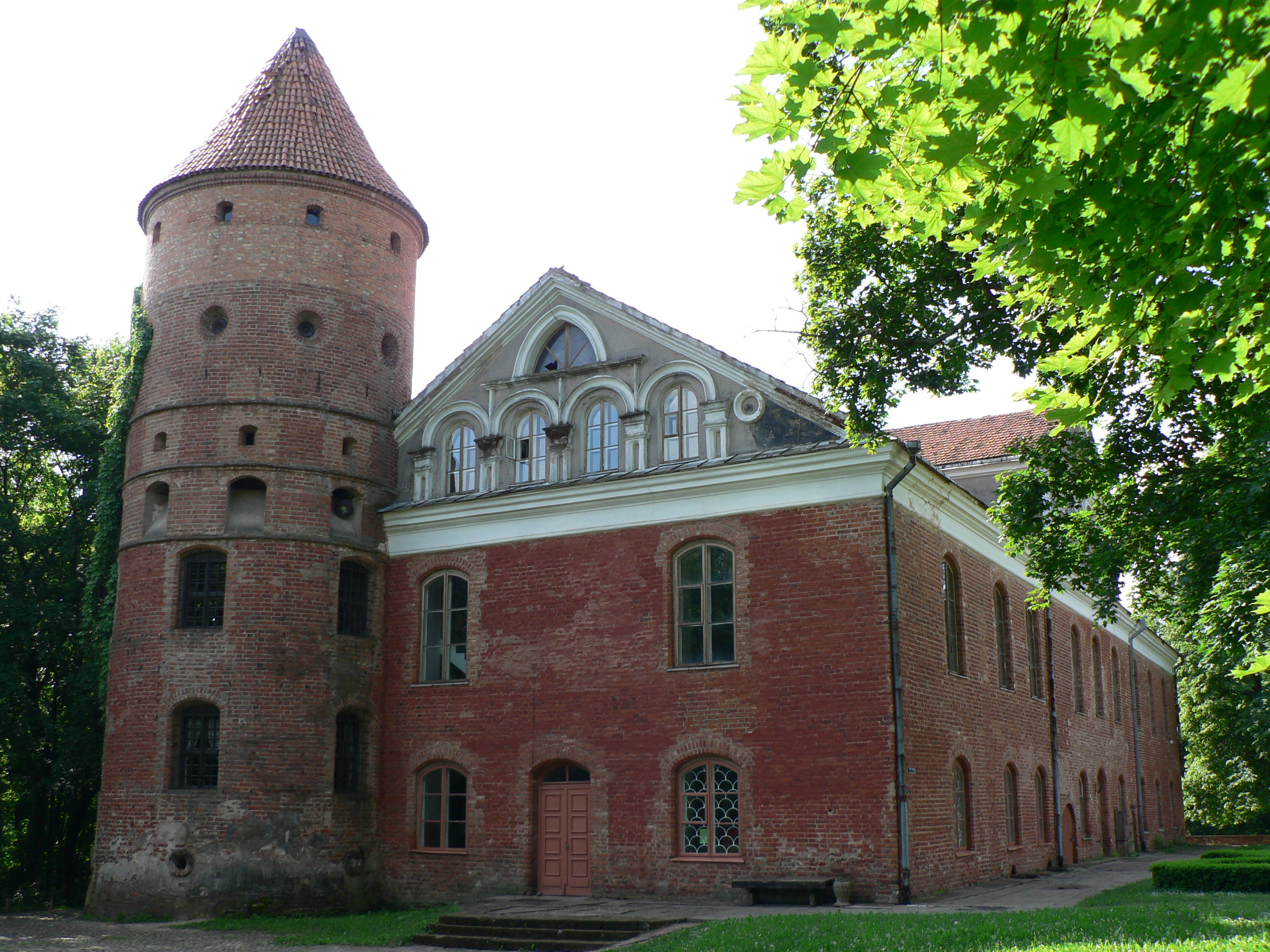 Tyszkiewicz castle in Raudondvaris, Lithuania. Author: Wojsyl